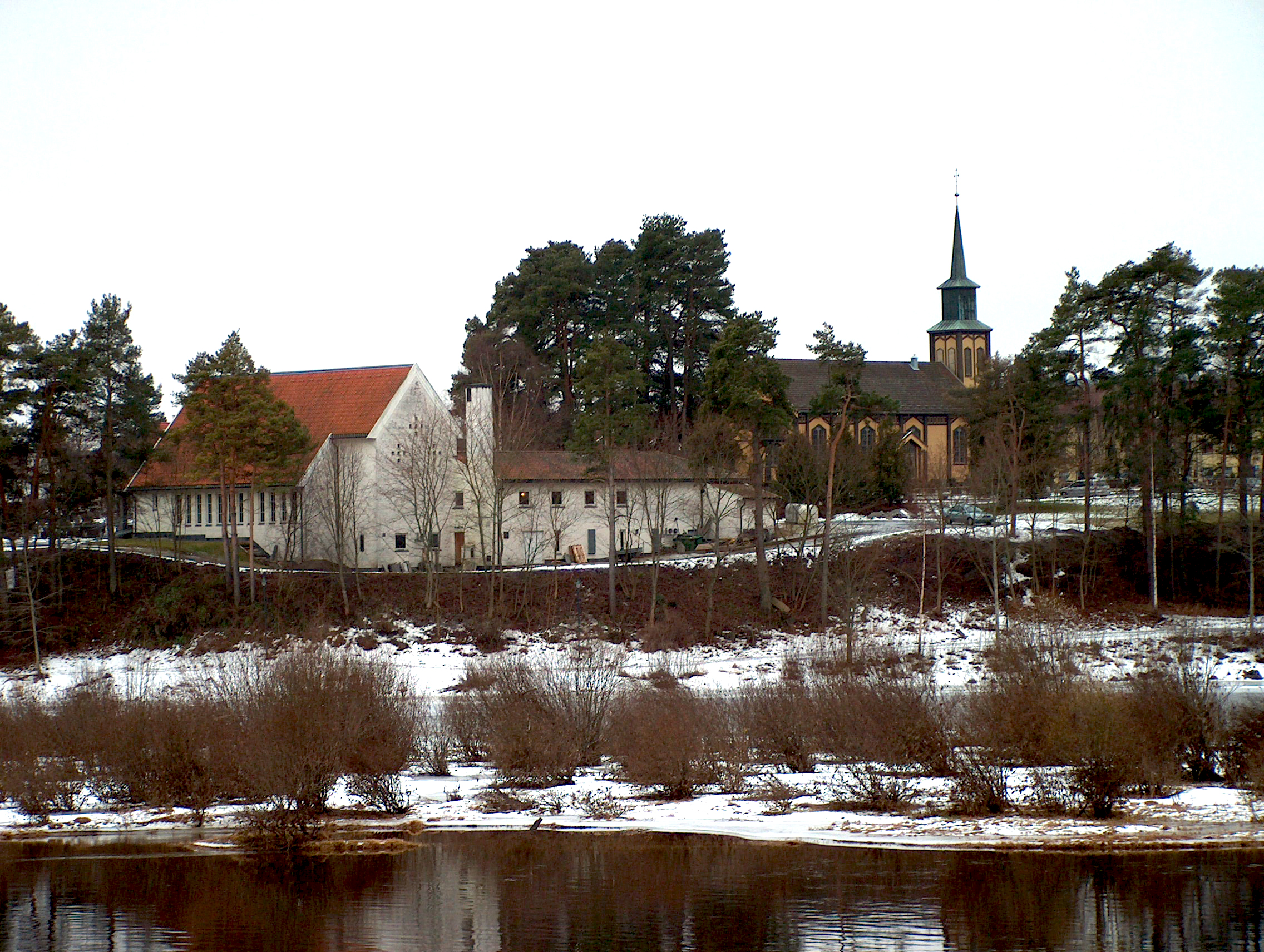 Ringerike Krematorium (Ringerike Crematory/Crematorium) og Hønefoss kirke (and Hønefoss Church)